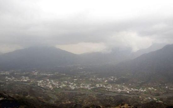 ختبة